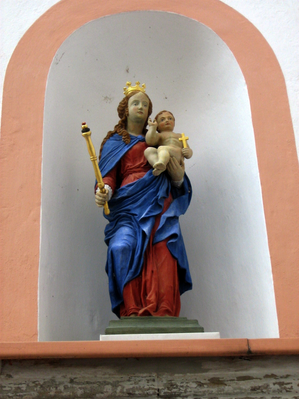 "Maria mit dem Kinde" im Kloster St. Marienthal in der Oberlausitz, Sachsen